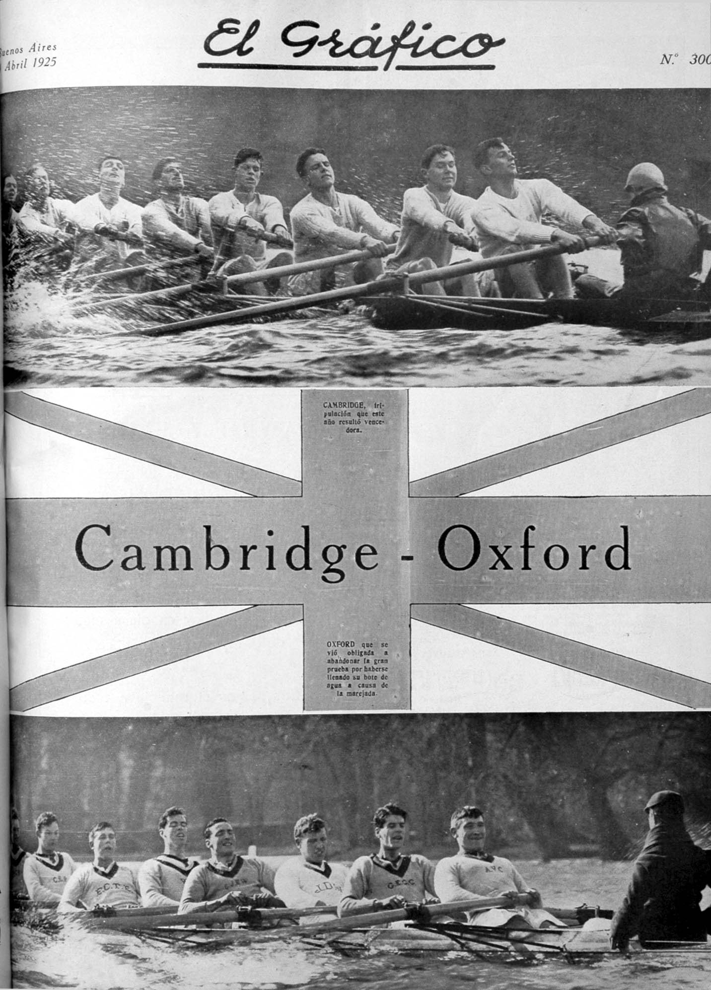 El Grafico del 04 de Abril de 1925. Edicion 300